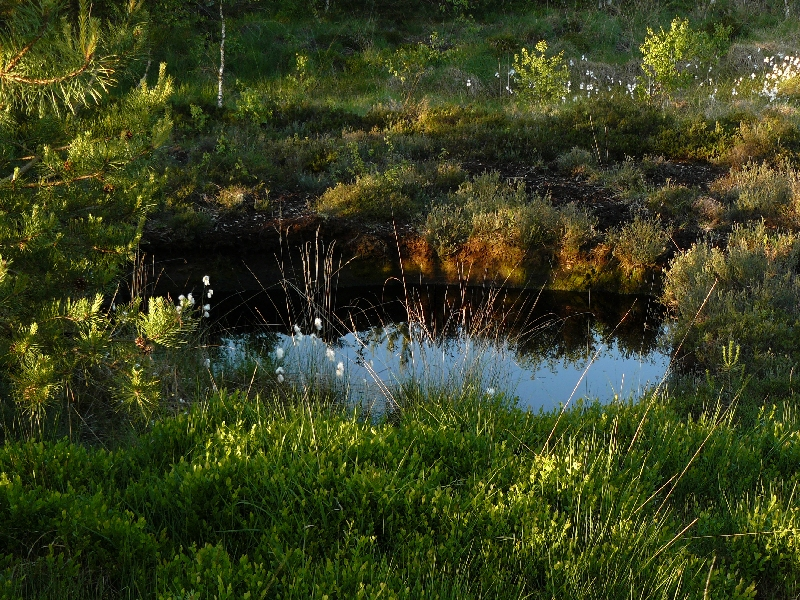 Gefluteter Torf-Handstich im Hohen Moor (Stade)